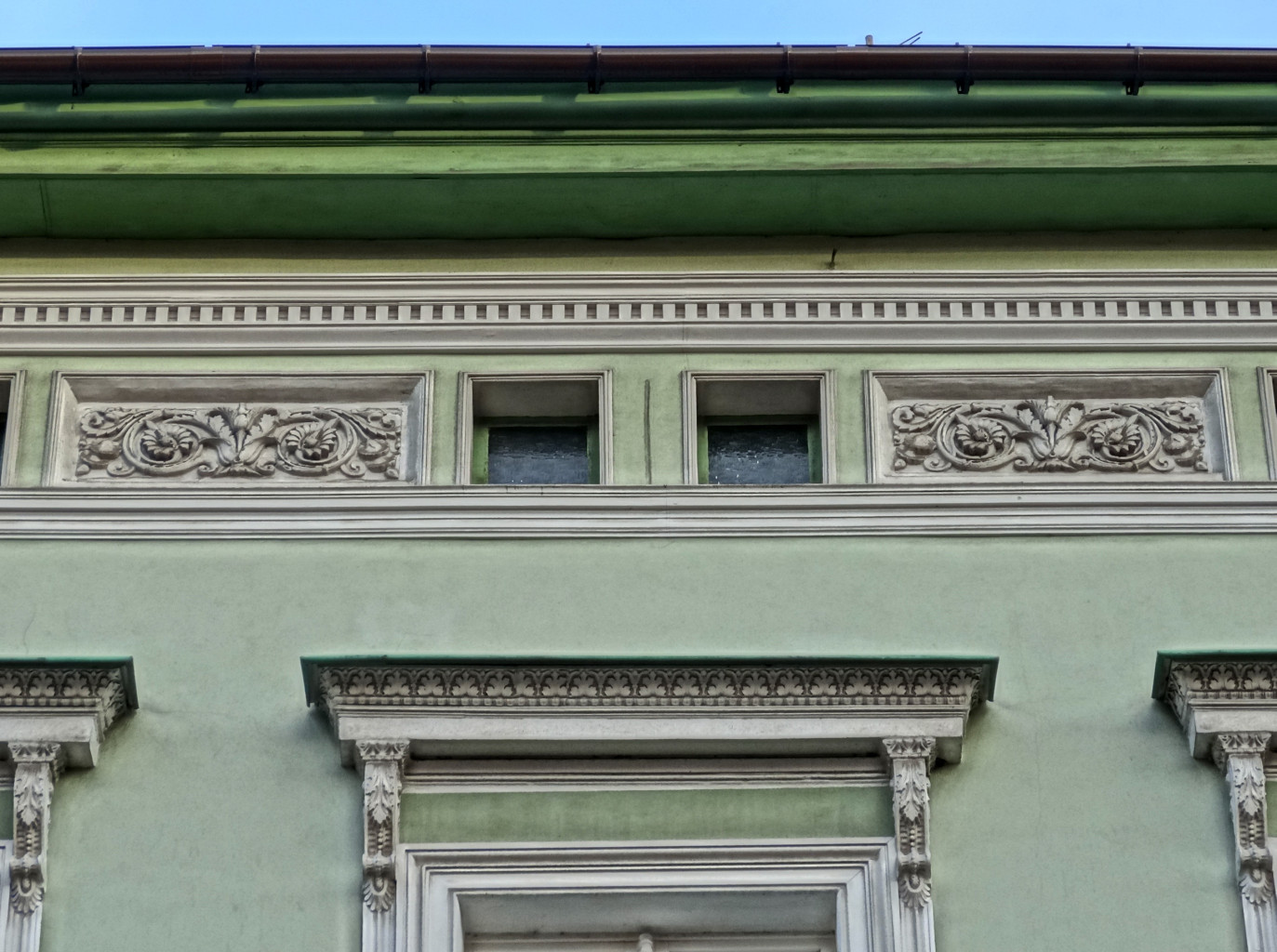 Kamienica przy ul. Długiej 53 w Bydgoszczy (1870)